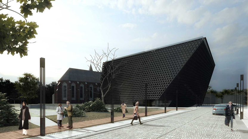 I nagroda w konkursie na koncepcję architektoniczną